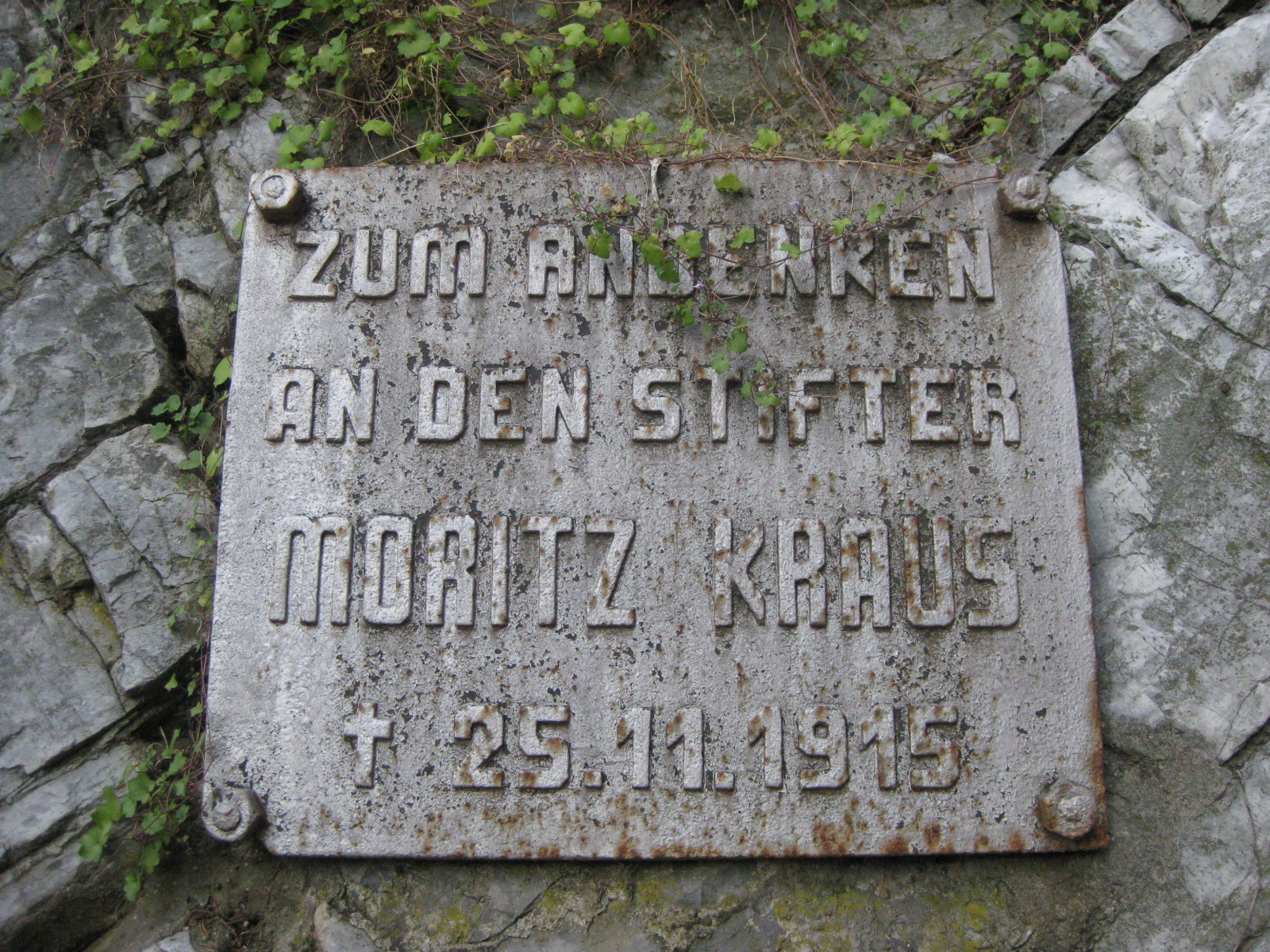 Erinnerungsschild im Kalkfelsen im unteren Torbau der Burg Stolberg